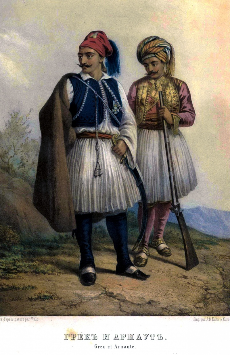 Грек и арнаут. Этнографическое описание народов России Густава-Федора Христиановича Паули